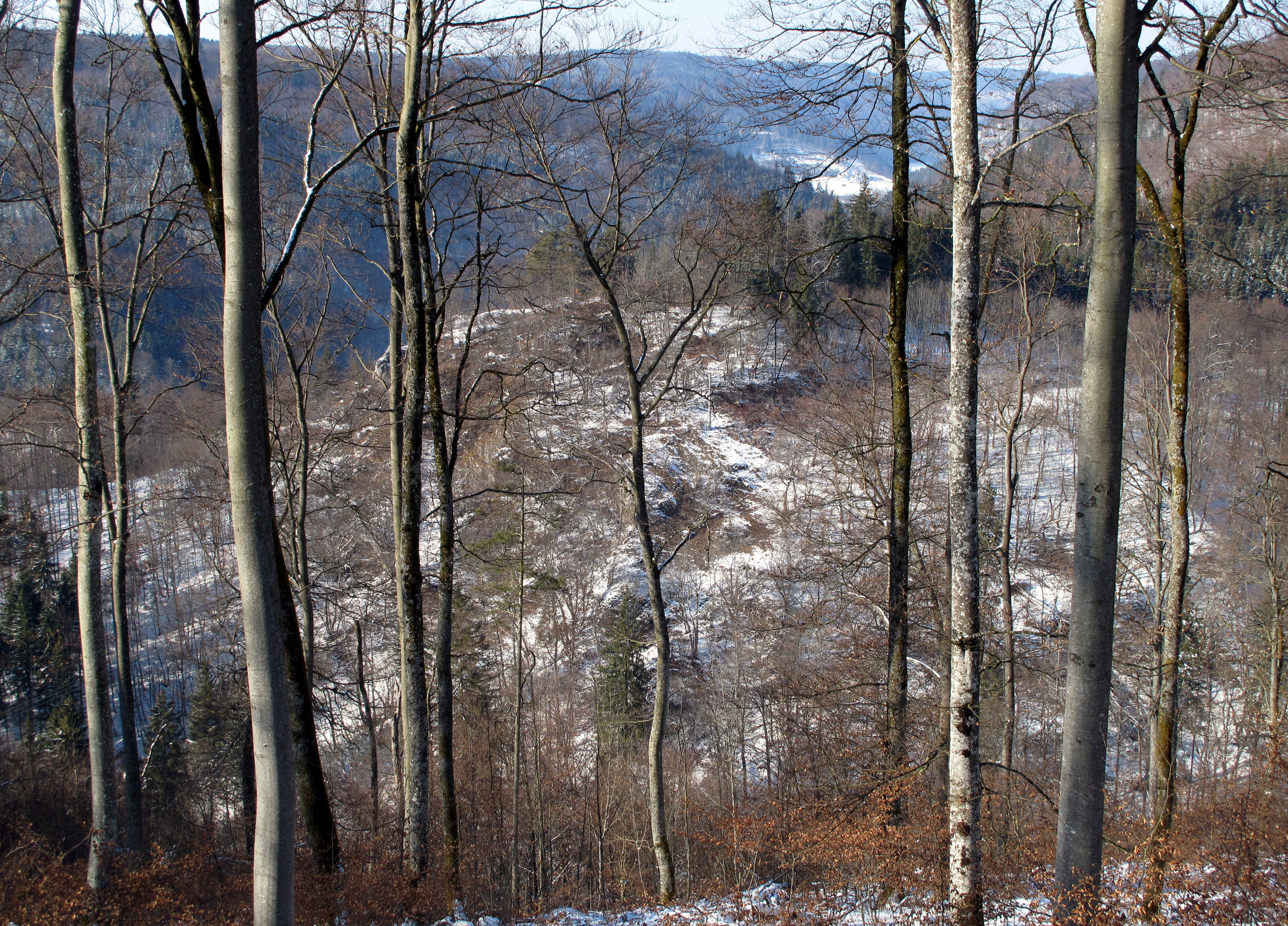 Blick vom Pfannenstiel auf den Nachbarfelsen mit den geringen Ruinenspuren der ehemaligen Burg Kreidenstein.